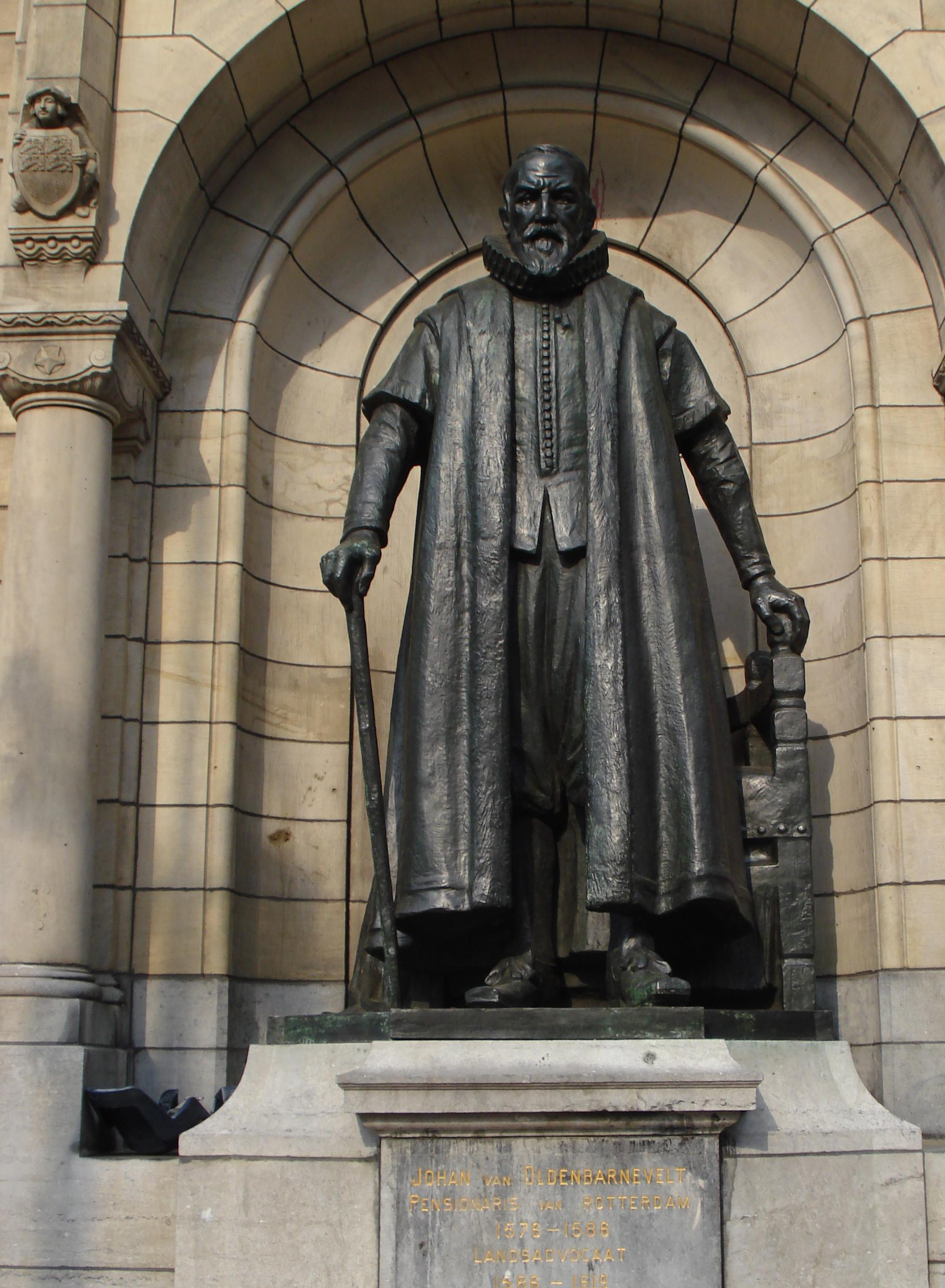 Rotterdam, Coolsingel, stadhuis. Standbeeld Johan van Oldenbarnevelt. Rotterdam/The Netherlands